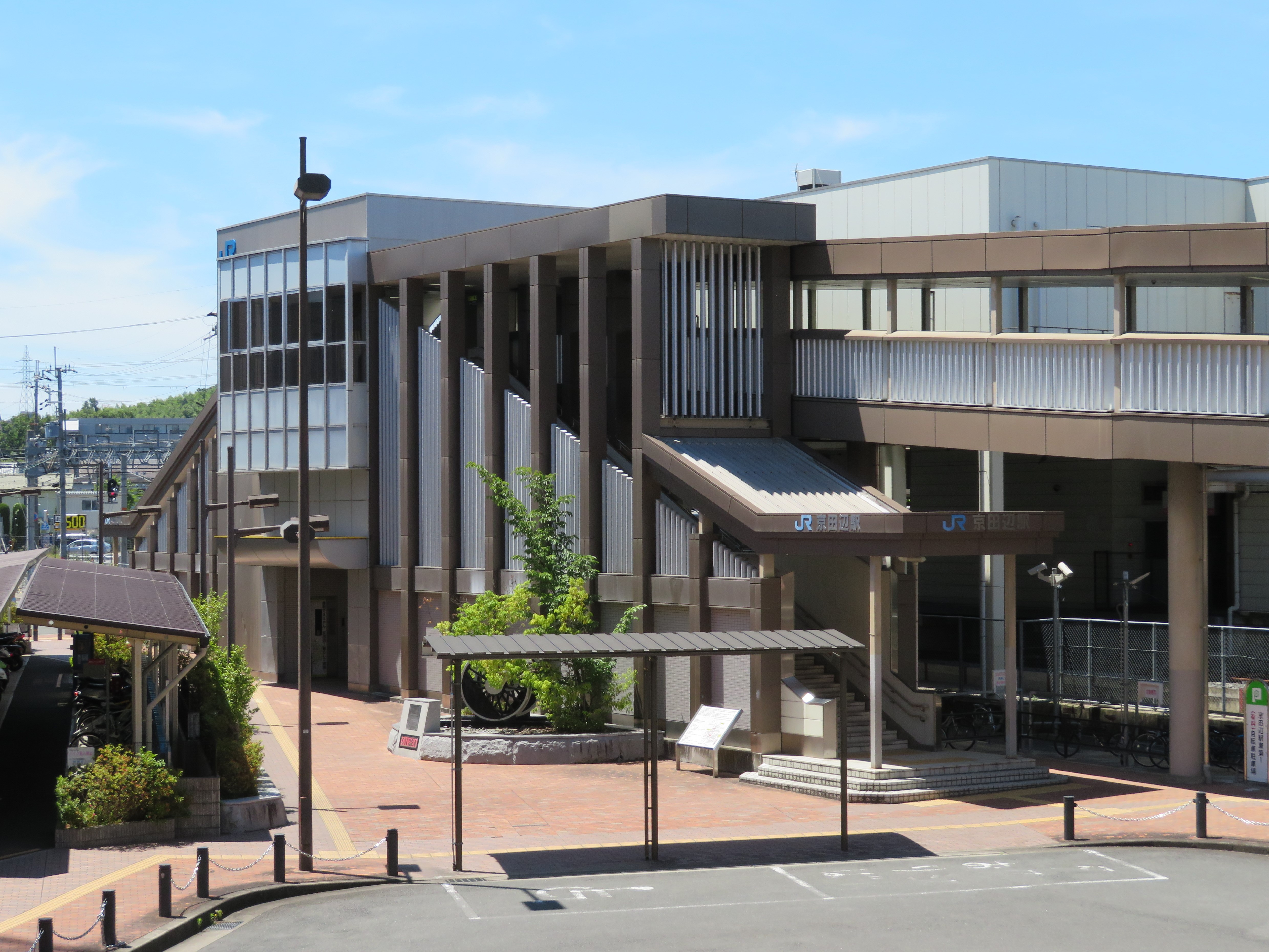 JR京田辺駅